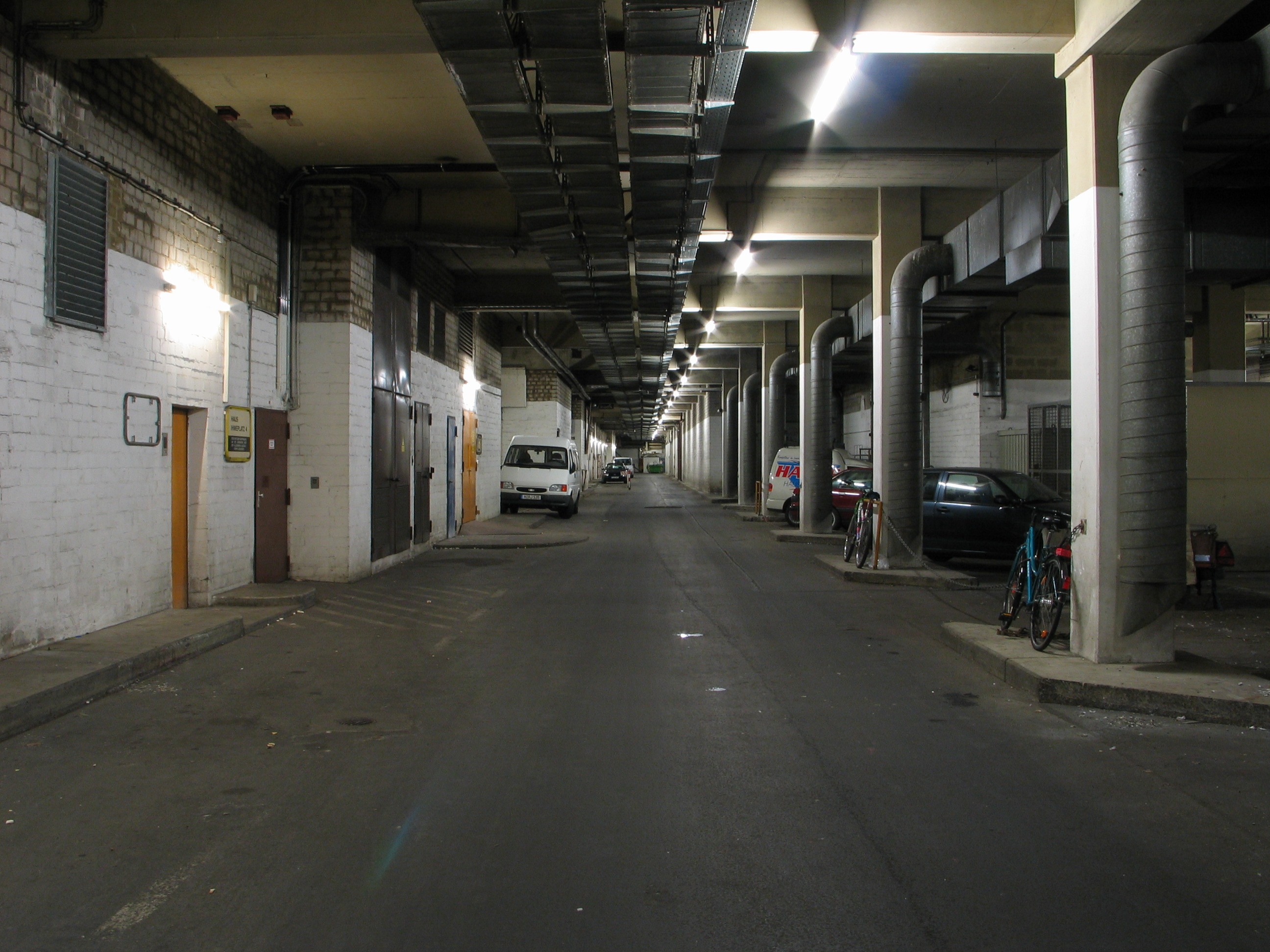 Street level in Ihme-Zentrum, Hannover